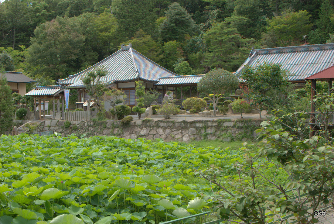 広島県三原市の棲真寺